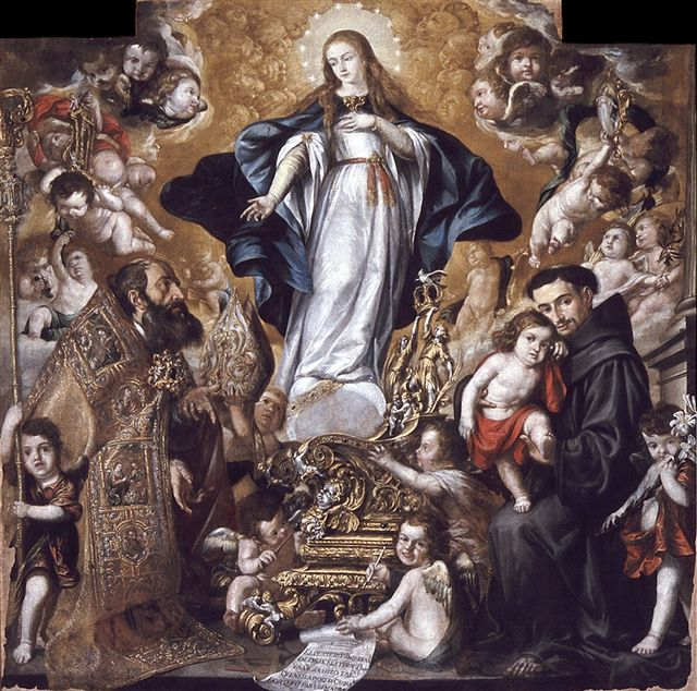 La obra representa a la Inmaculada Concepción acompañada por San Eloy, el patrón de los orfebres, y por San Antonio de Padua, que lleva en brazos al Niño Jesús.